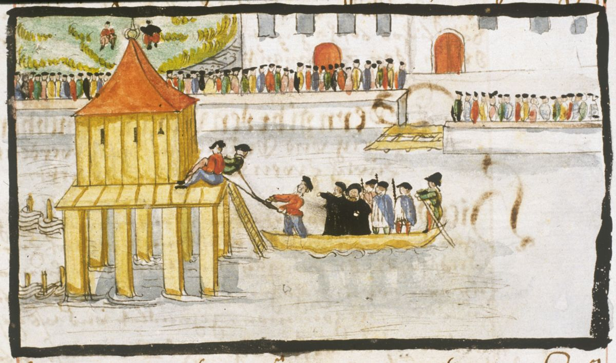 Ertränkung der Grüninger Täufer Jakob Falk und Heini Reimann am 5. September 1528